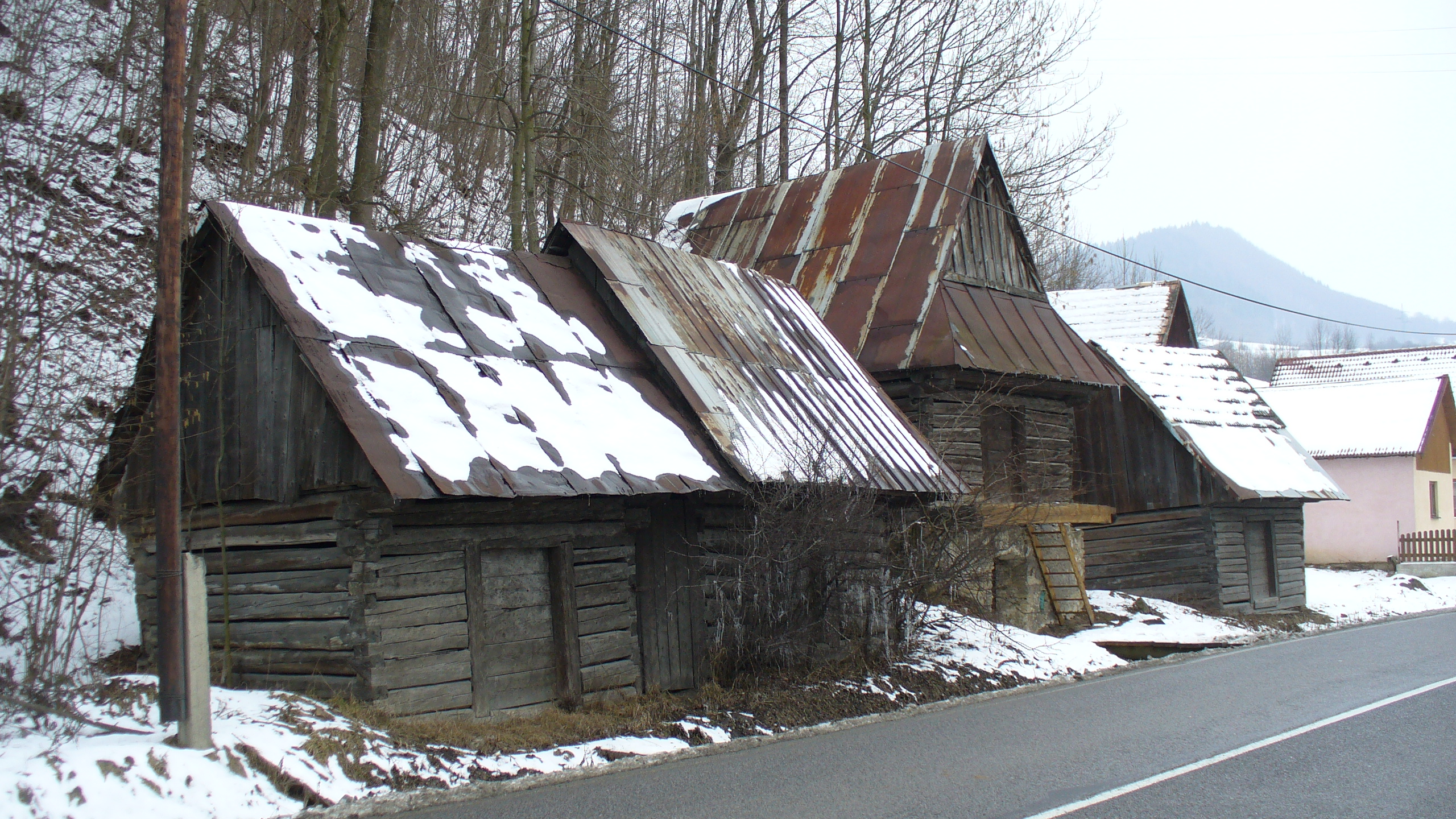 Dlhá nad Oravou (okres Dolny Kubin)